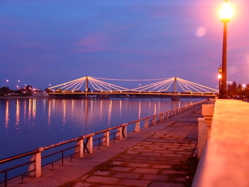 Puente Colgante de noche, ciudad de Santa Fe (Argentina)